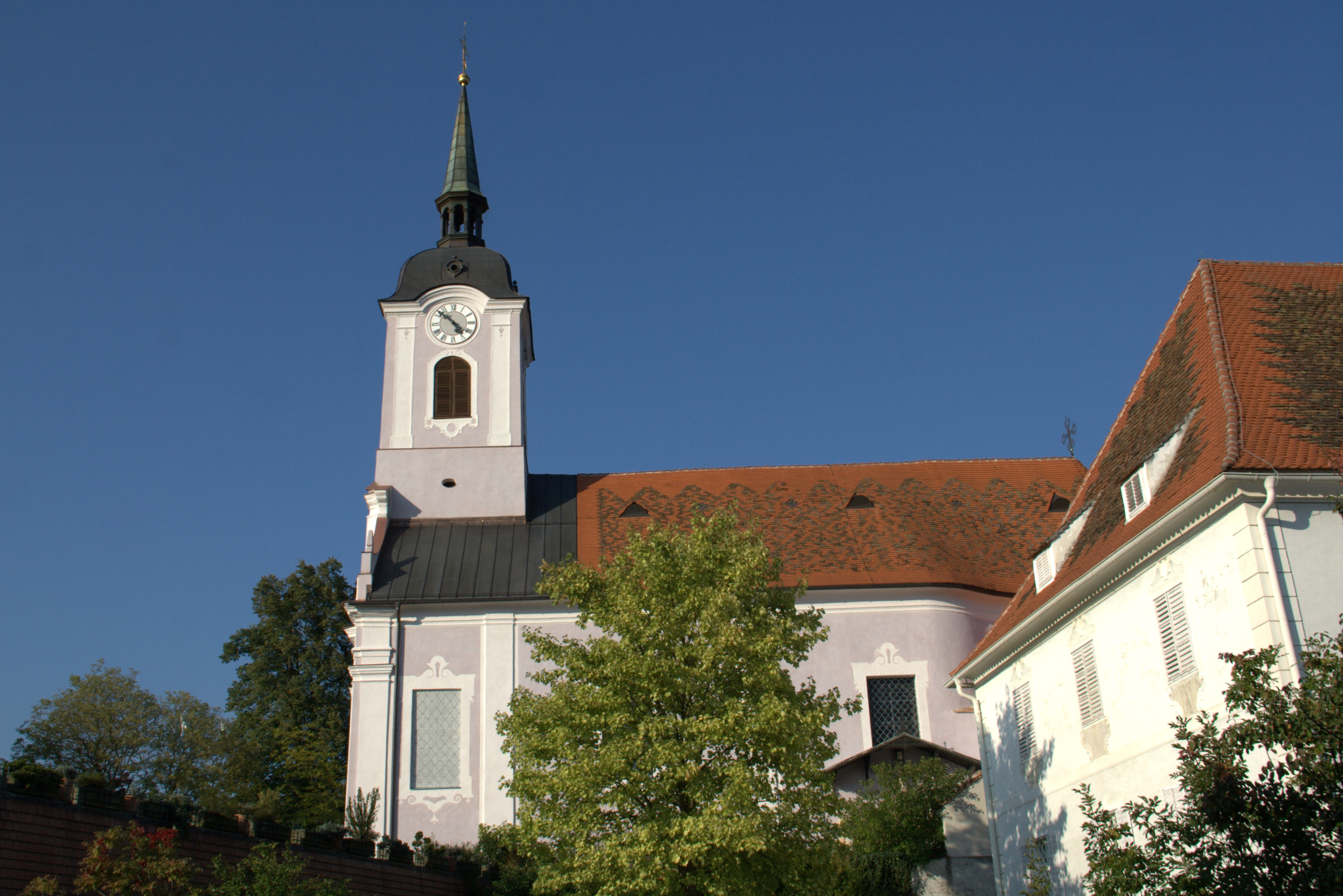 Kath. Pfarrkirche hl. Nikolaus